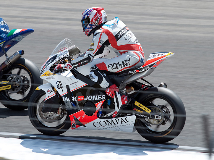 raffaela de rosa kenny noyes